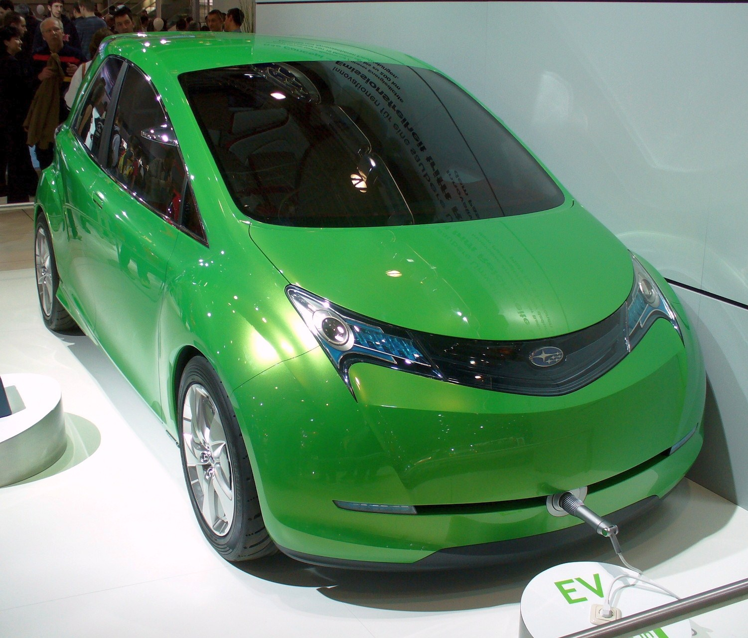 Subaru G4e Concept